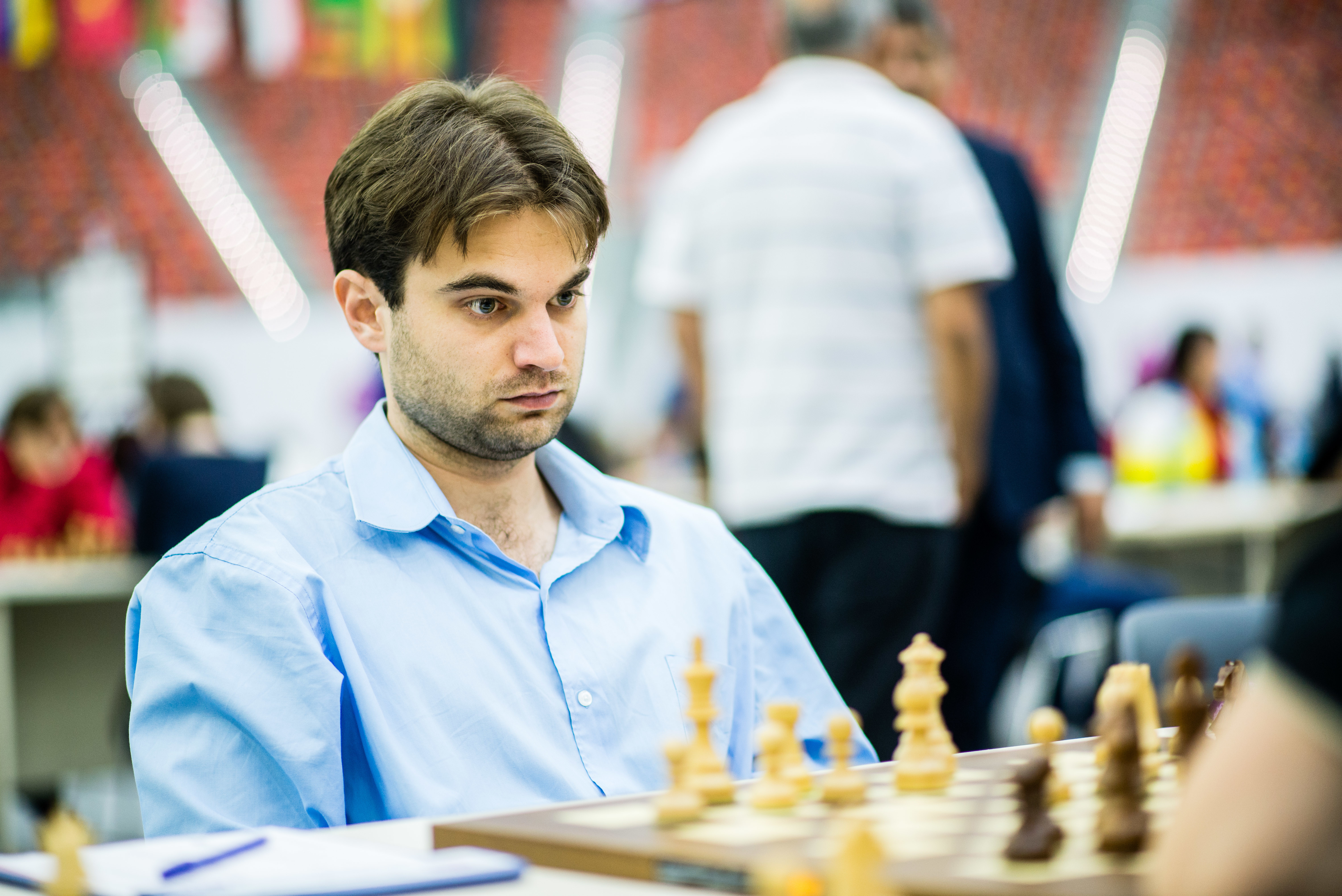 Shankland Samuel